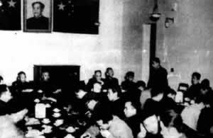 中國科學院的院士正在討論思想改造的「學習計劃」